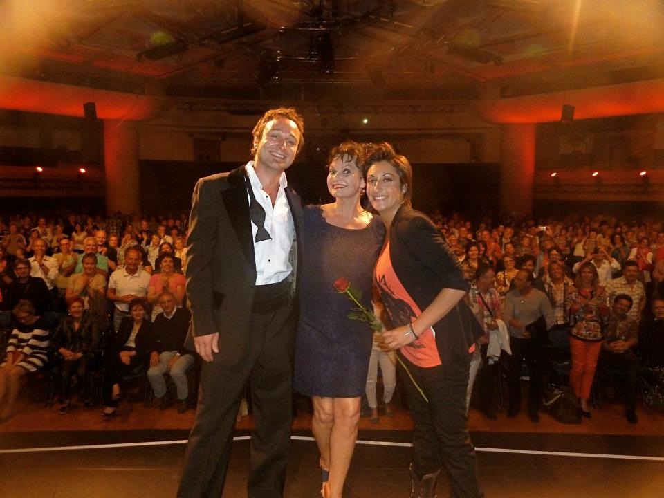 Maurane, Antoine Gratton et Victoria en juin 2012 lors d'un concert à Monaco